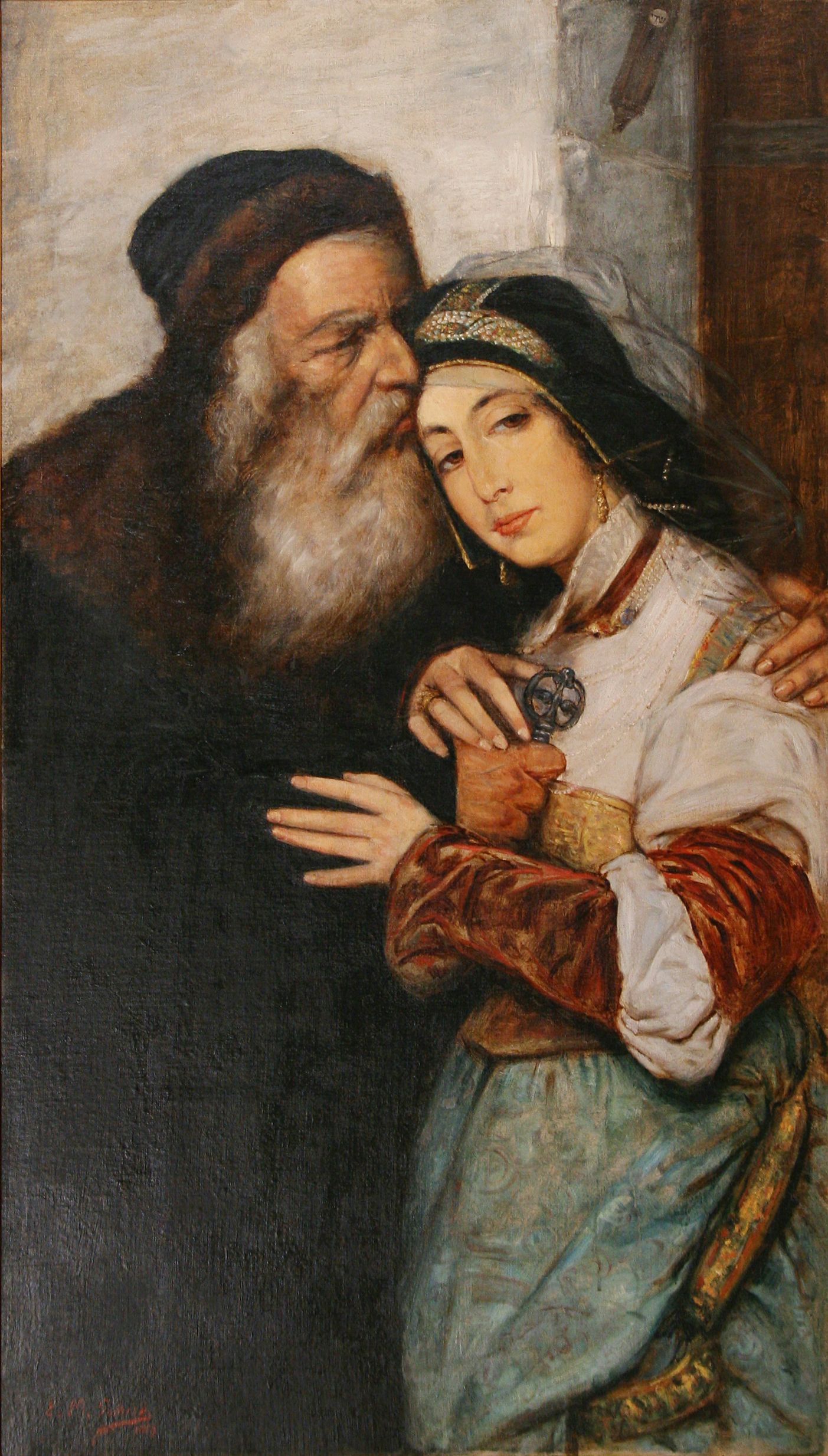 Kopia zaginionego obrazu Maurycego Gottlieba "Shylock i Jessica" z 1887 roku.